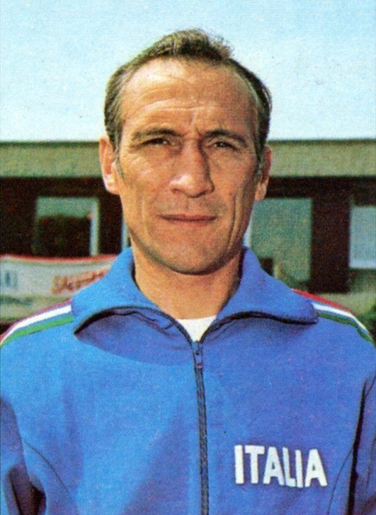 CALCIATORI 1975-76 Panini - Figurina-Sticker n. 392 - BEARZOT